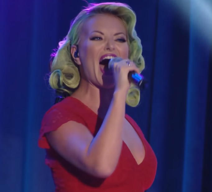 Secvență dintr-un concert al Deliei Matache în 2016